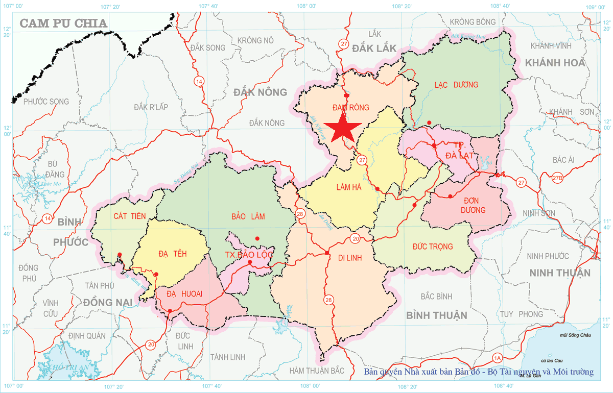 Vị trí đam rông